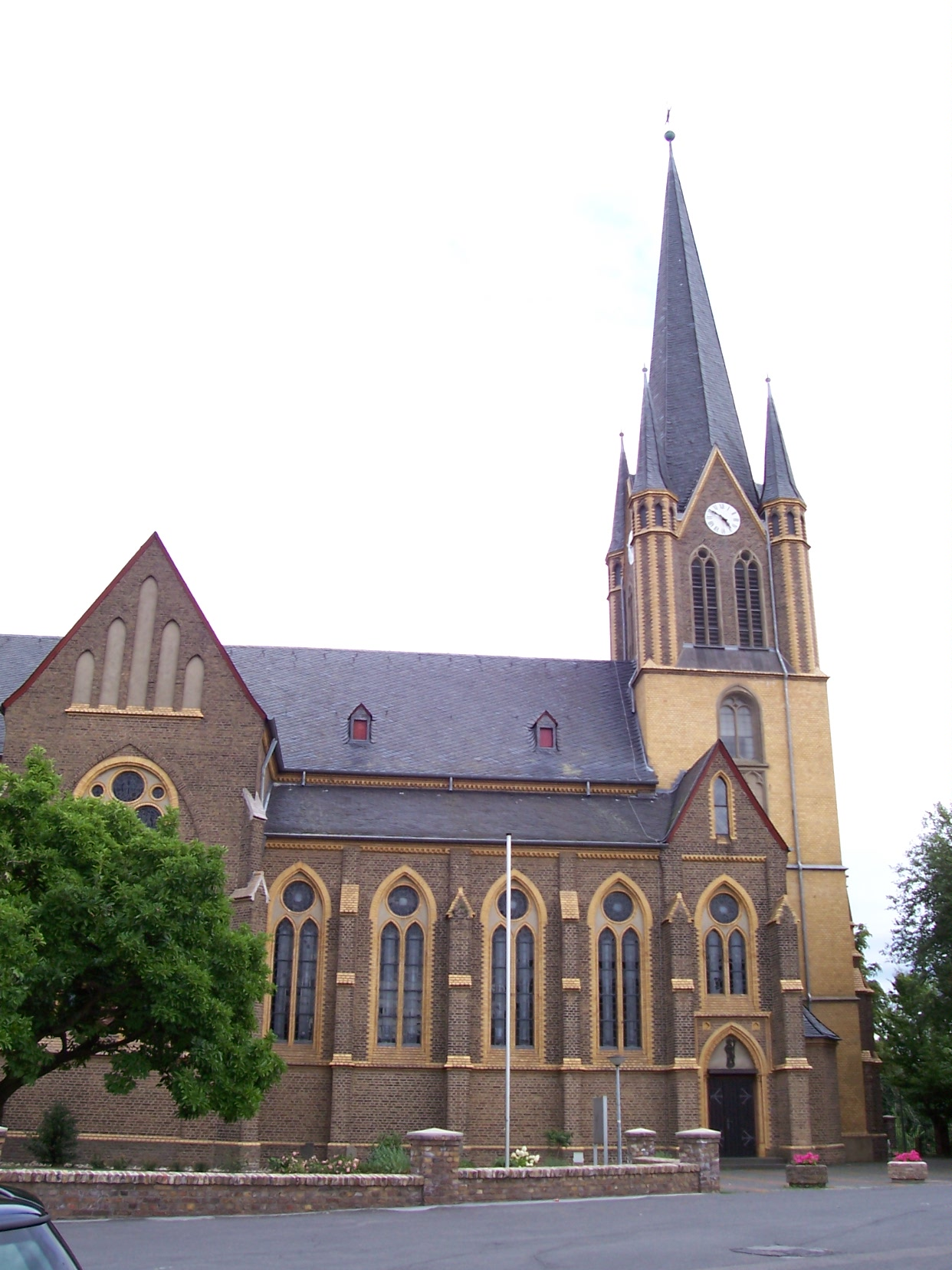 Katholische Pfarrkirche St. Evergislus, Bornheim-Brenig: Seitenansicht